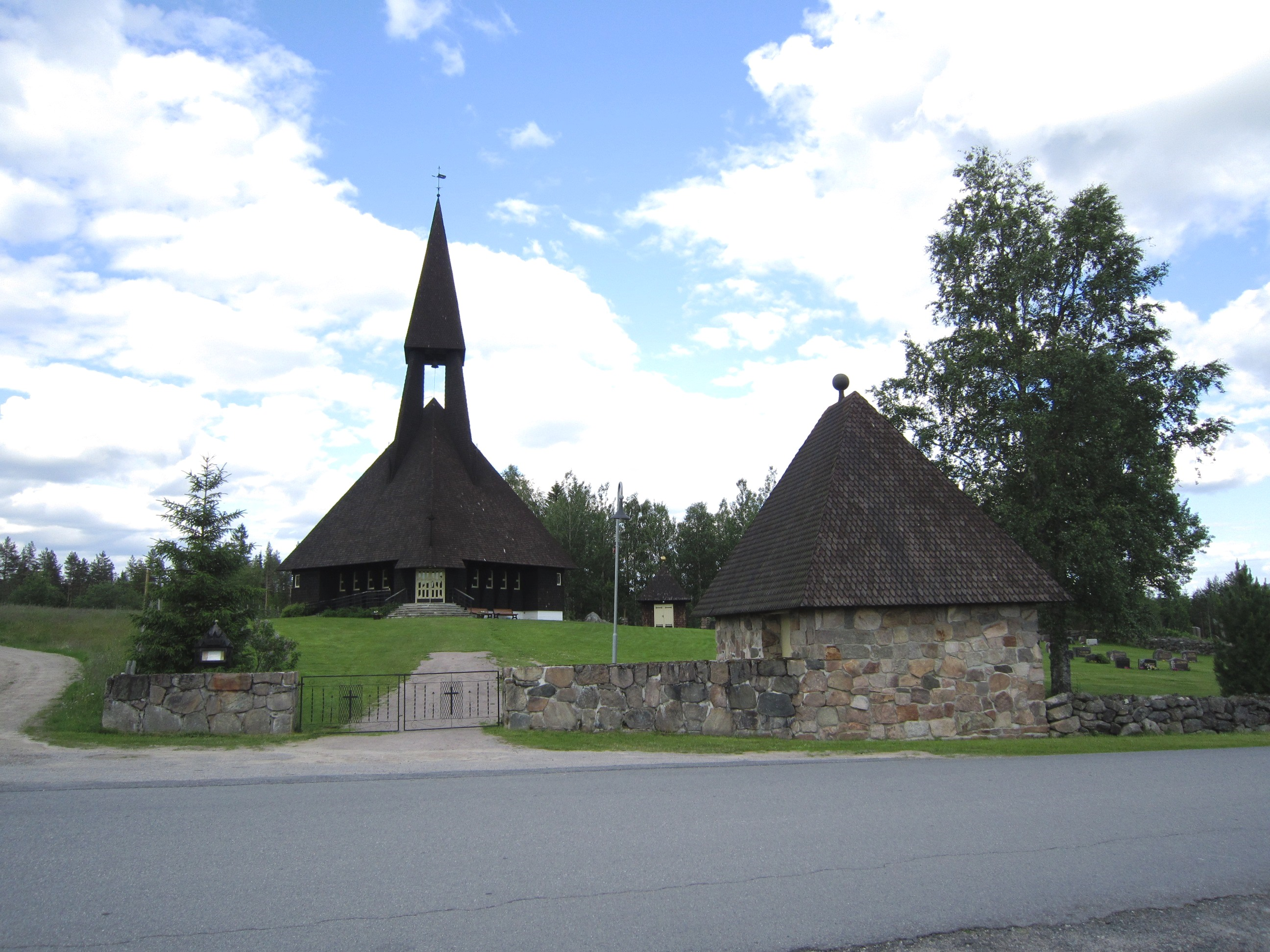 Gravberget kirke ved fylkesvei 461